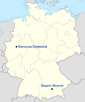 کلاسیک آلمان